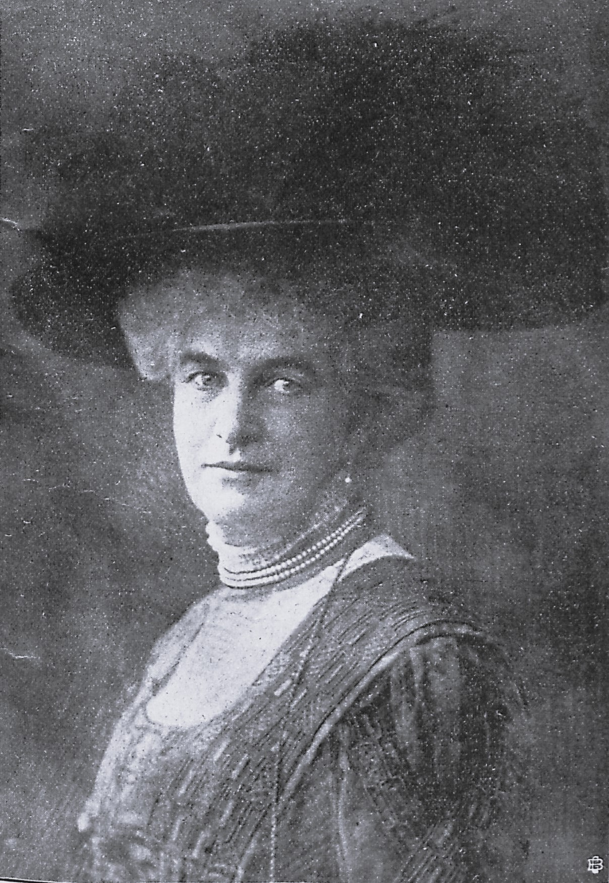 Ida Boy-Ed. Zu ihrem 60. Geburtstage.